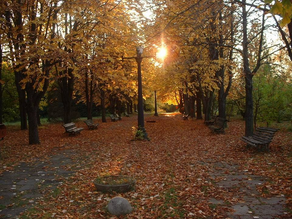 Iaşi Botanical Garden